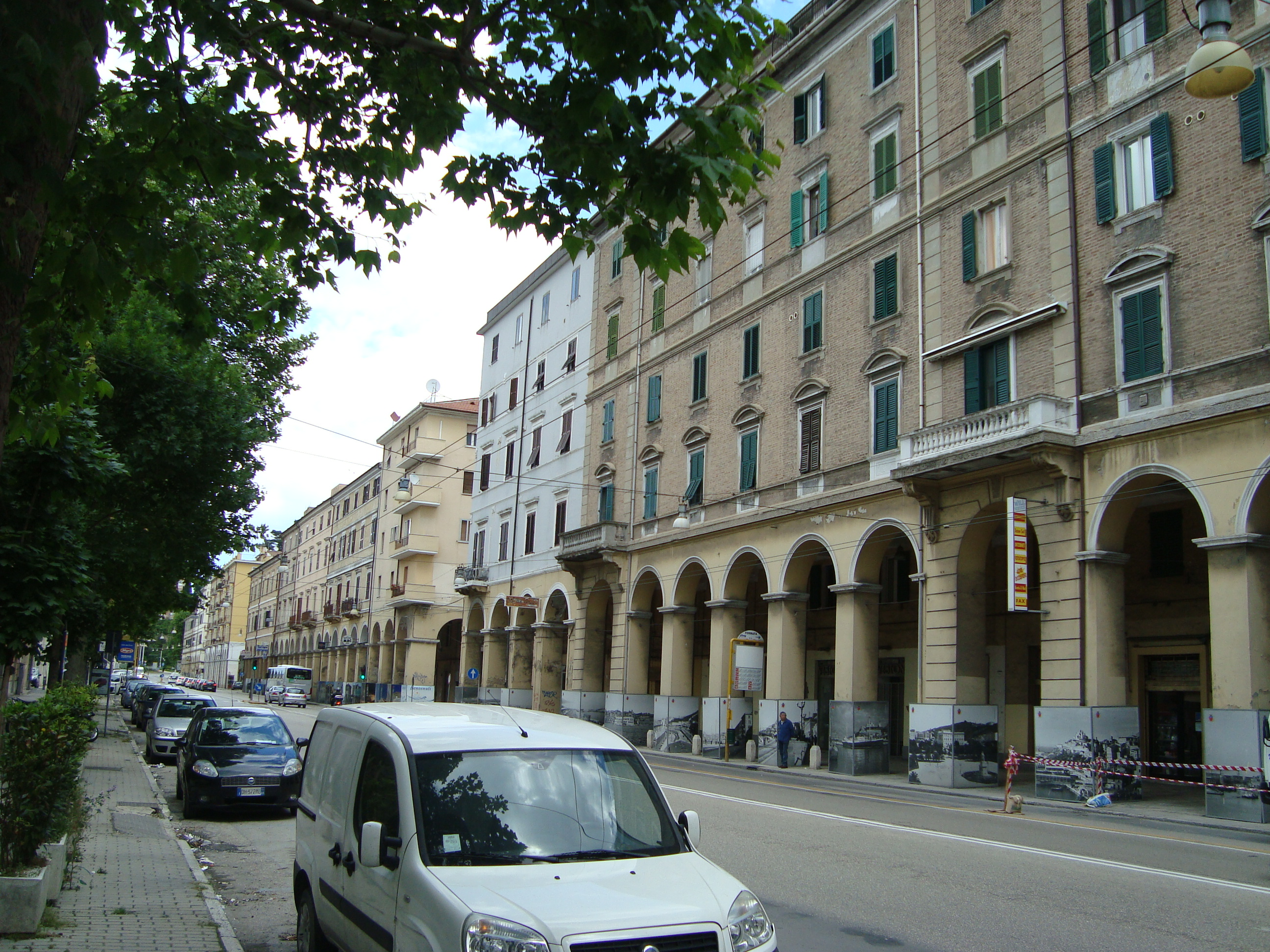 via Guglielmo Marconi, rione degli Archi, Ancona